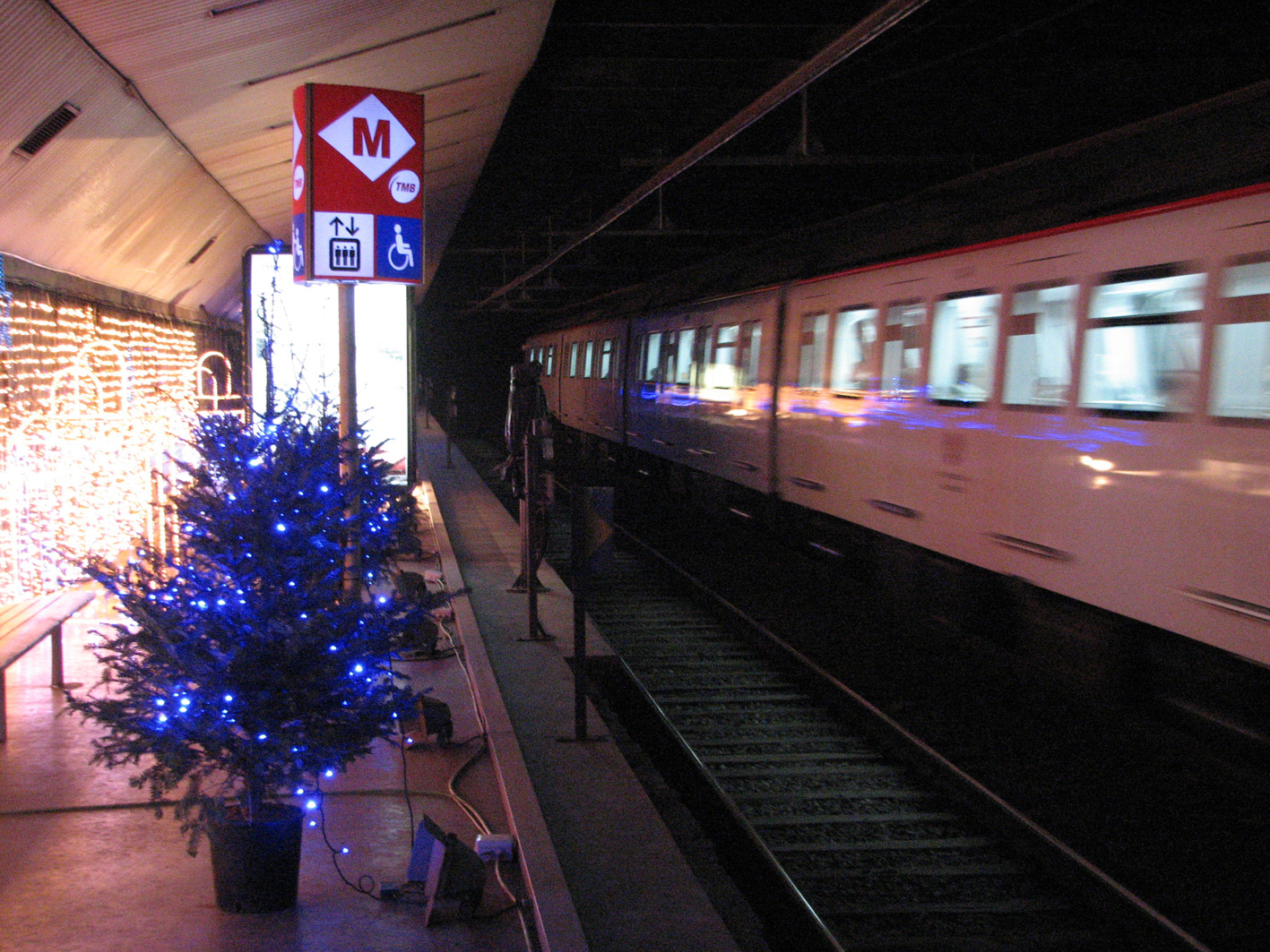 La estación «fantasma» del Metro de Barcelona «Gaudí», con decoración navideña con motivo de una campaña de TMB en 2008.